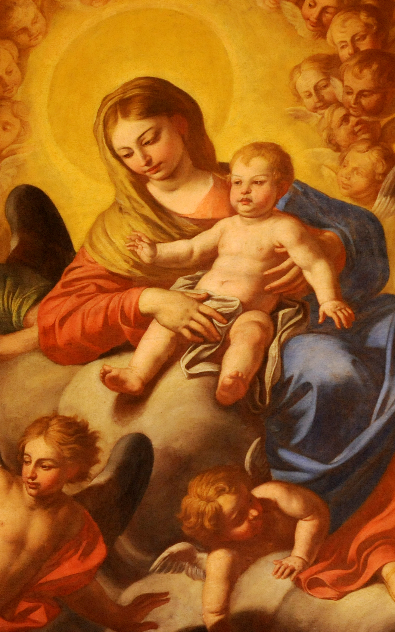 Angelo Solimena, Vergine col Bambino tra San Matteo e San Pietro (1706), particolare